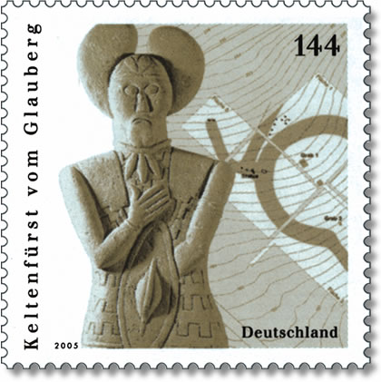 Deutsche Sonderbriefmarke “Keltenfürst vom Glauberg” aus der Serie “Sonderbriefmarkenserie Archäologie in Deutschland”, Maße: 35,00 × 35,00 mm, Nennwert: 144 cent, Ausgabetag: 3. Januar 2005, Hersteller: Bagel Security-Print